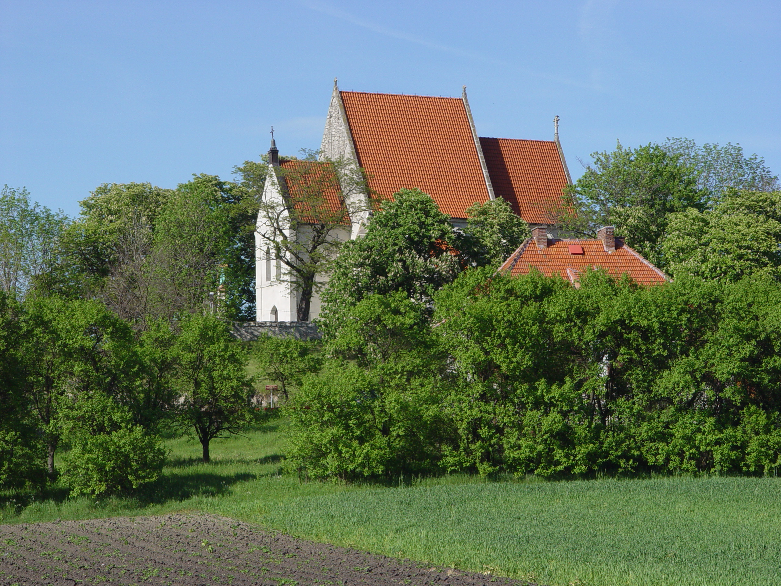 PL Chotel Czerwony, kościół i plebania, widok od południa